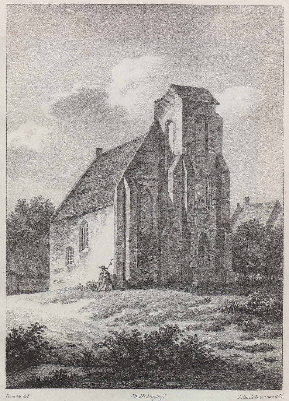 Sint-Godelieveklooster, Gistel